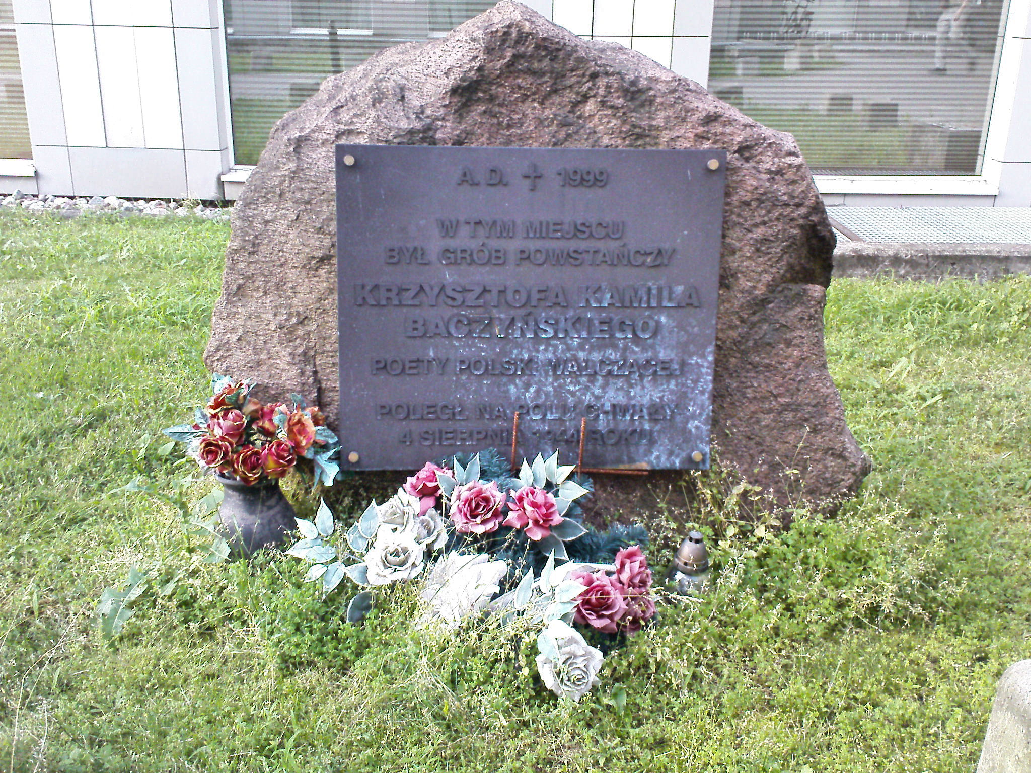 Miejsce upamiętniające powstańczy grób Krzysztofa Kamila Baczyńskiego na dziedzińcu Pałacu Jabłonowskich